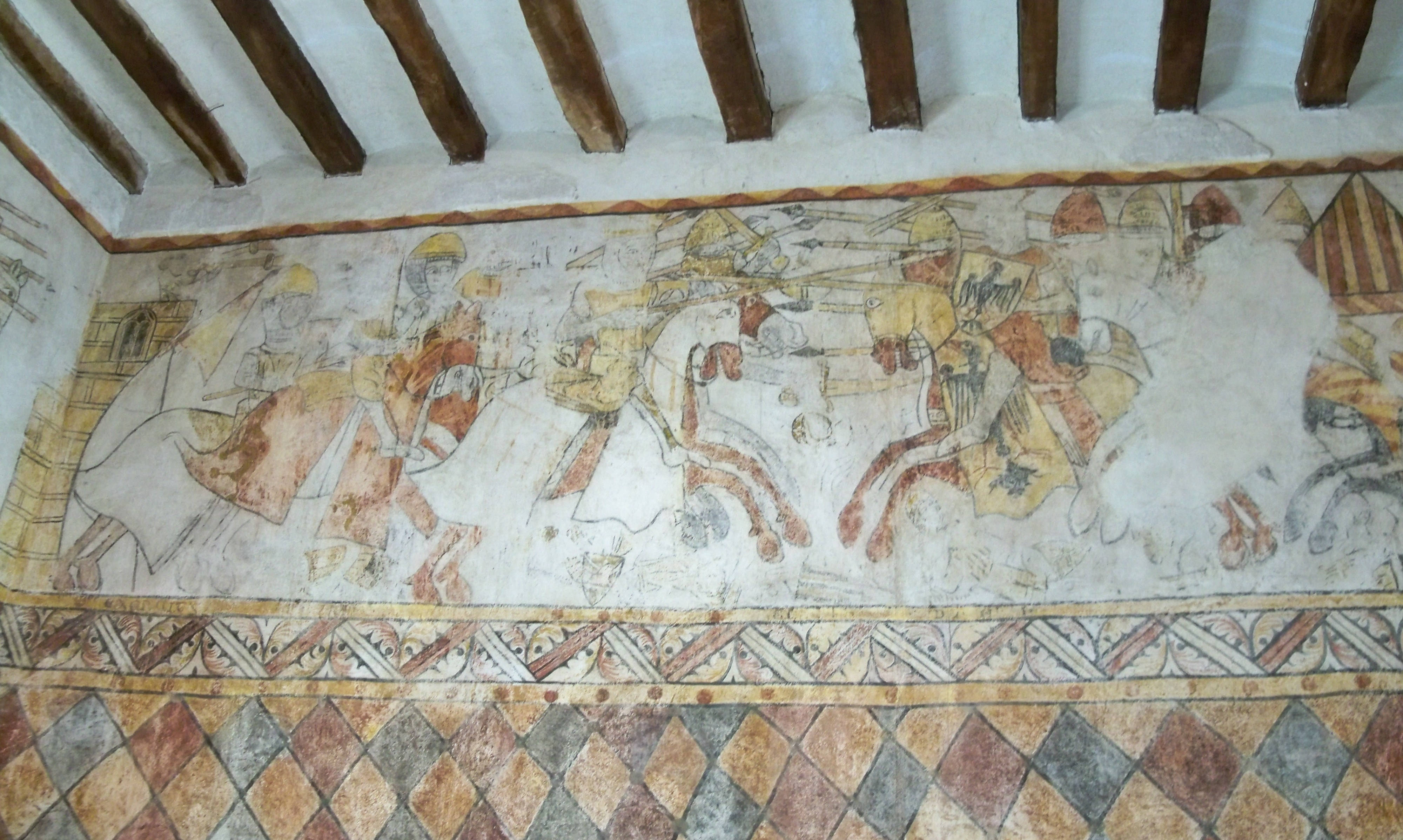 fresques de la Tour Ferrande à Pernes les Fontaines, Vauccluse, France